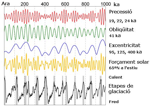 Mostra diferents aspectes de les variacions causades pel cicle de Milankovitx.